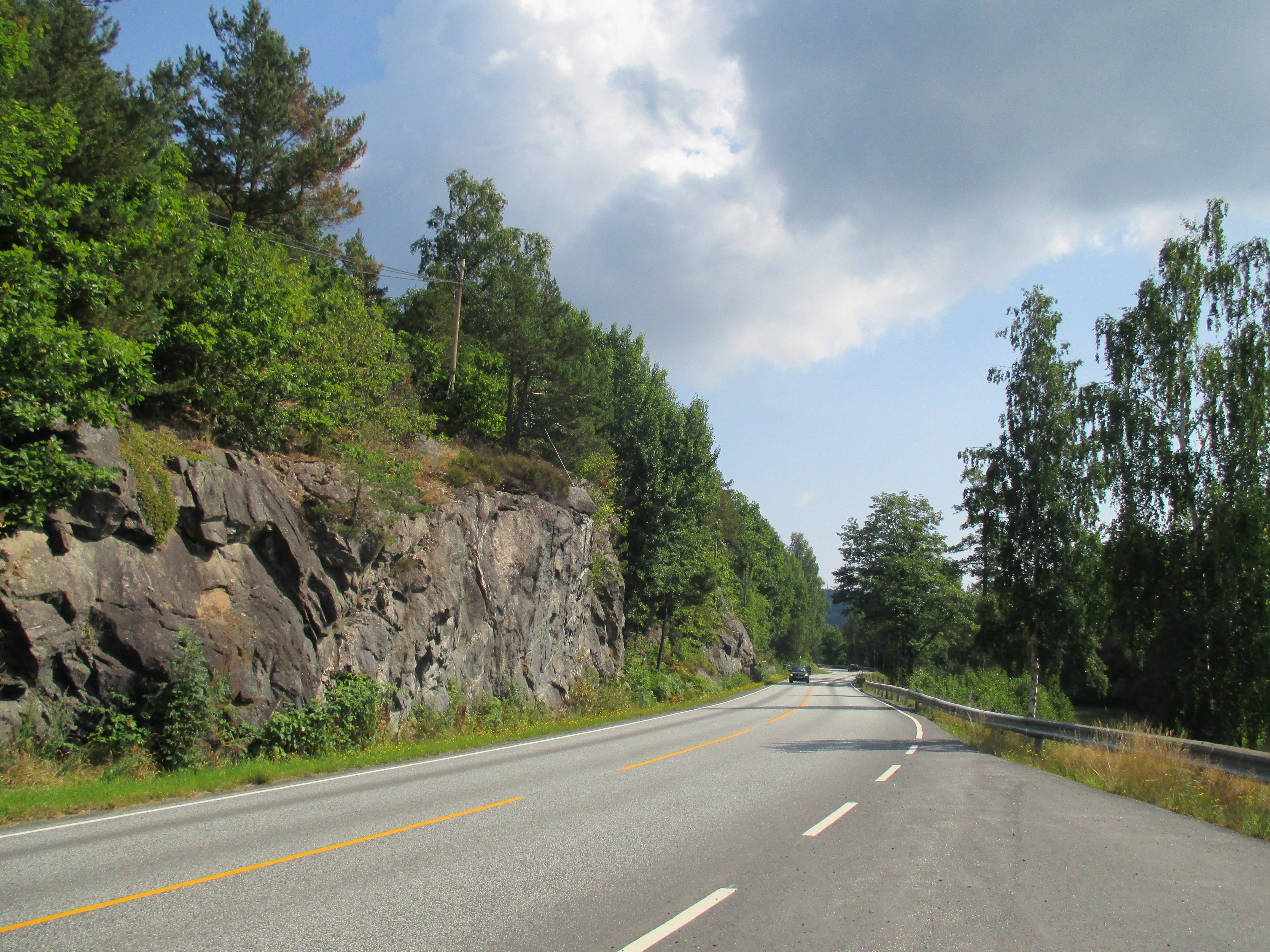 Fylkesvei 416 et stykke vest for Risør by